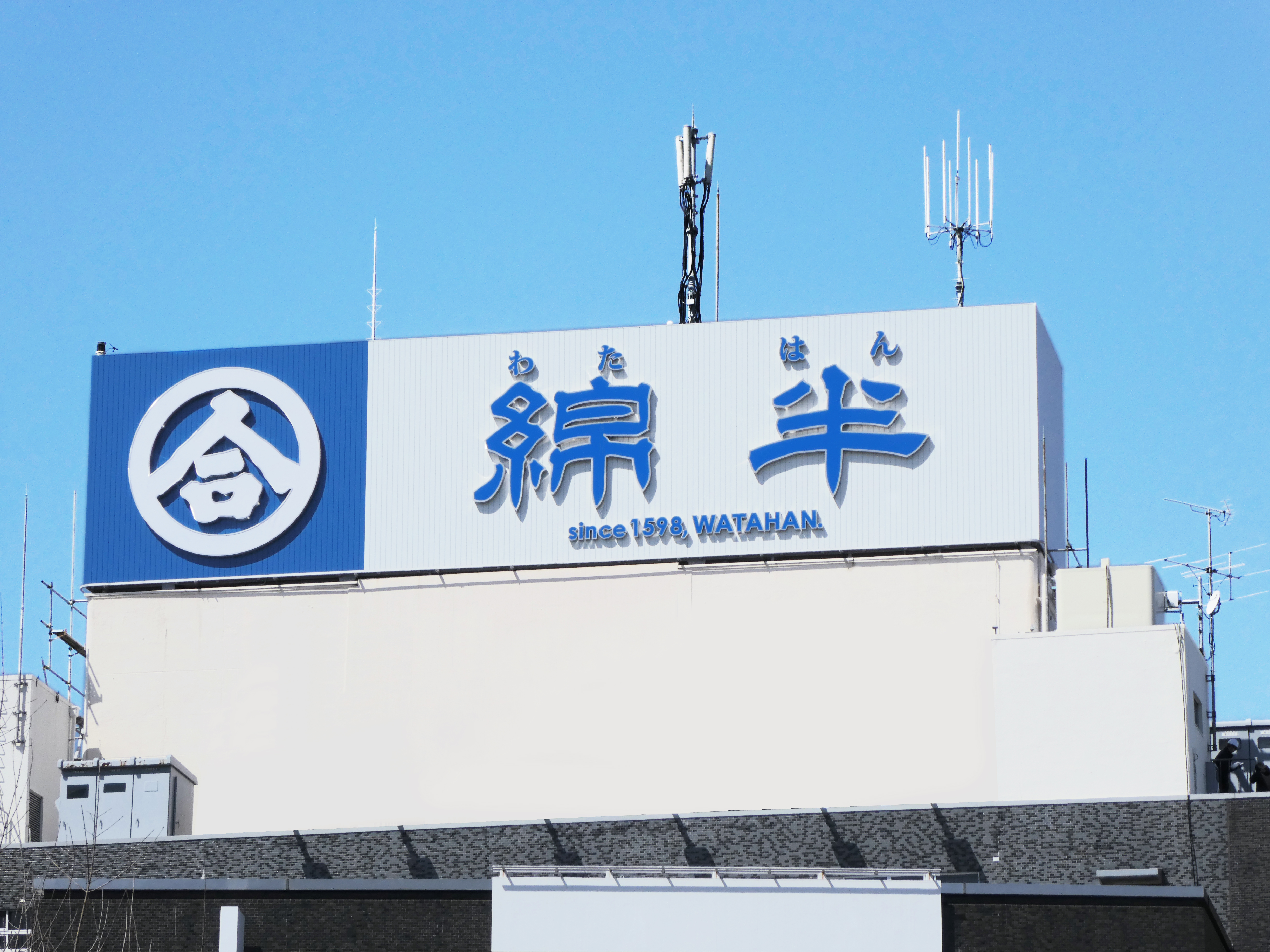 本社ビル看板